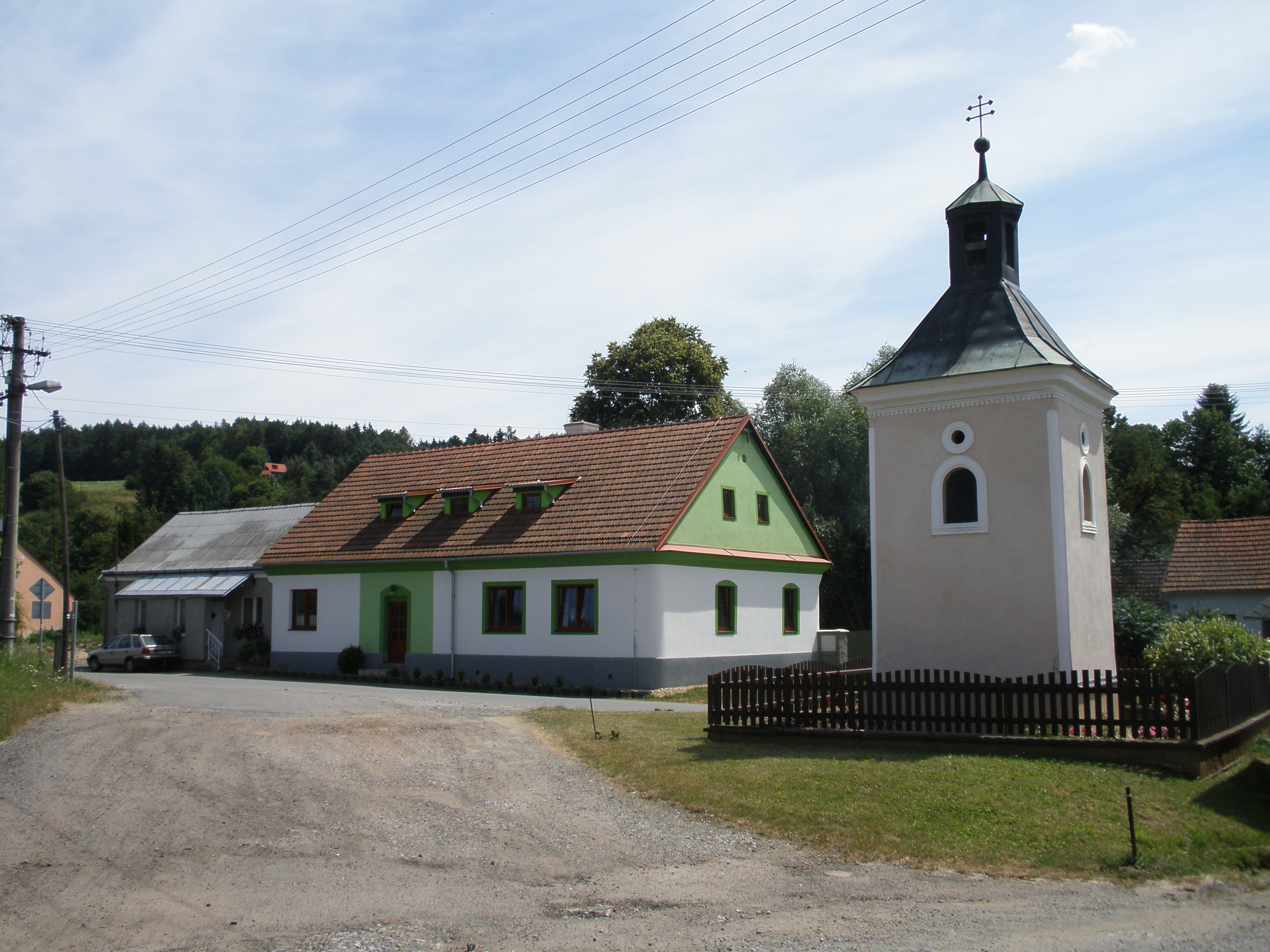 Vesnice Kladoruby, která je součástí města Letovice